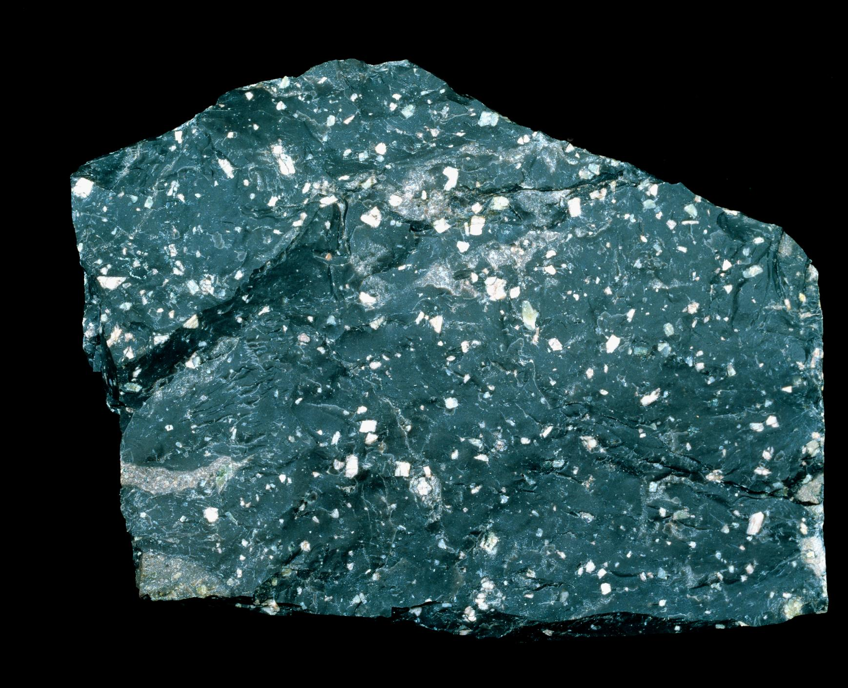 Dalarnas landskapssten, dalaporfyren, har sitt ursprung i våldsamma vulkanutbrott på ett 15 kvadratmil stort område för 1,7 miljarder år sedan, Glödande moln av lava och lava full av gaser sprutade upp och rann ner över omgivningen, utan motstånd, blixtsnabbt och brännhett. Varje utbrott hade sin unika sammansättning och därför finns det över hundra varianter av dalaporfyren, bland annat älvdalsporfyr